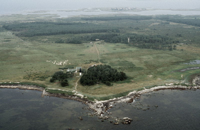 Utlängans fyrplats. Bilden är tagen mot (väderstreck): NNV Motiv: Utlängan Nyckelord: Flygbilder, Riksintressen Kategori: Kust- och skärgårdsmiljö, Fyrplats Utlängans fyrplats. Bilden är tagen mot (väderstreck): NNV.